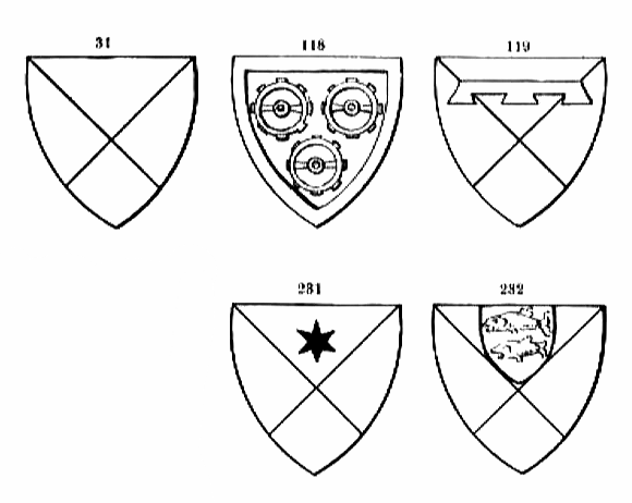 Wappen derer von Lampertheim bei Straßburg, Wappen von magister Johannes Engelbrecht im Siegel 1313 (3 Zahnräder), gestorben 1313 oder 1314, Wappen derer Engelbrecht allgemein, Wappen derer von Lampertheim in Bolsenheim und derer Scholl von Lampertheim, Wappen derer von Lampertheim genannt von Bolsenheim.